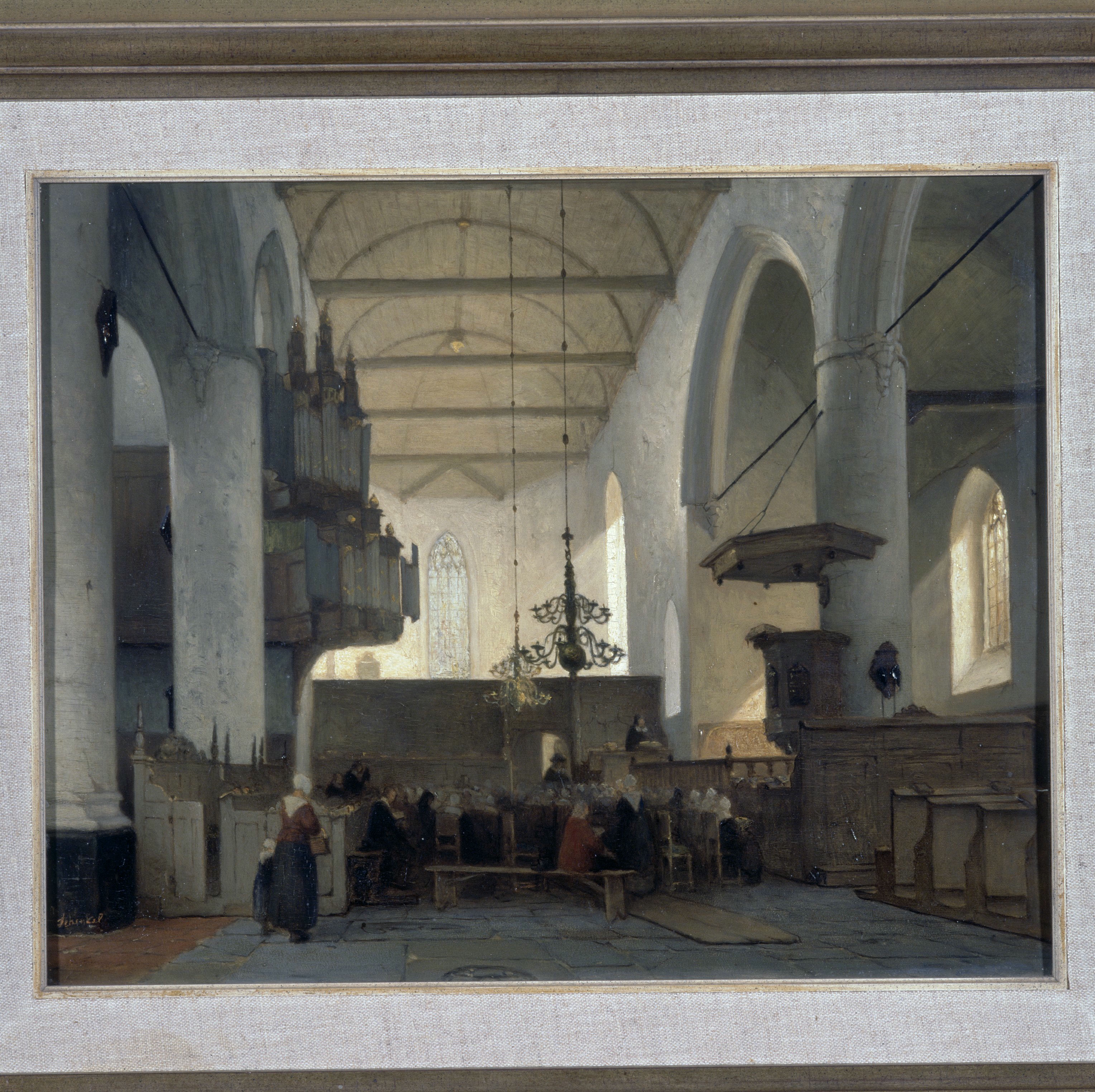 Broerekerk: Schilderij, interieur met orgel (opmerking: Gefotografeerd voor Het Historische Orgel in Nederland 1790-1818)